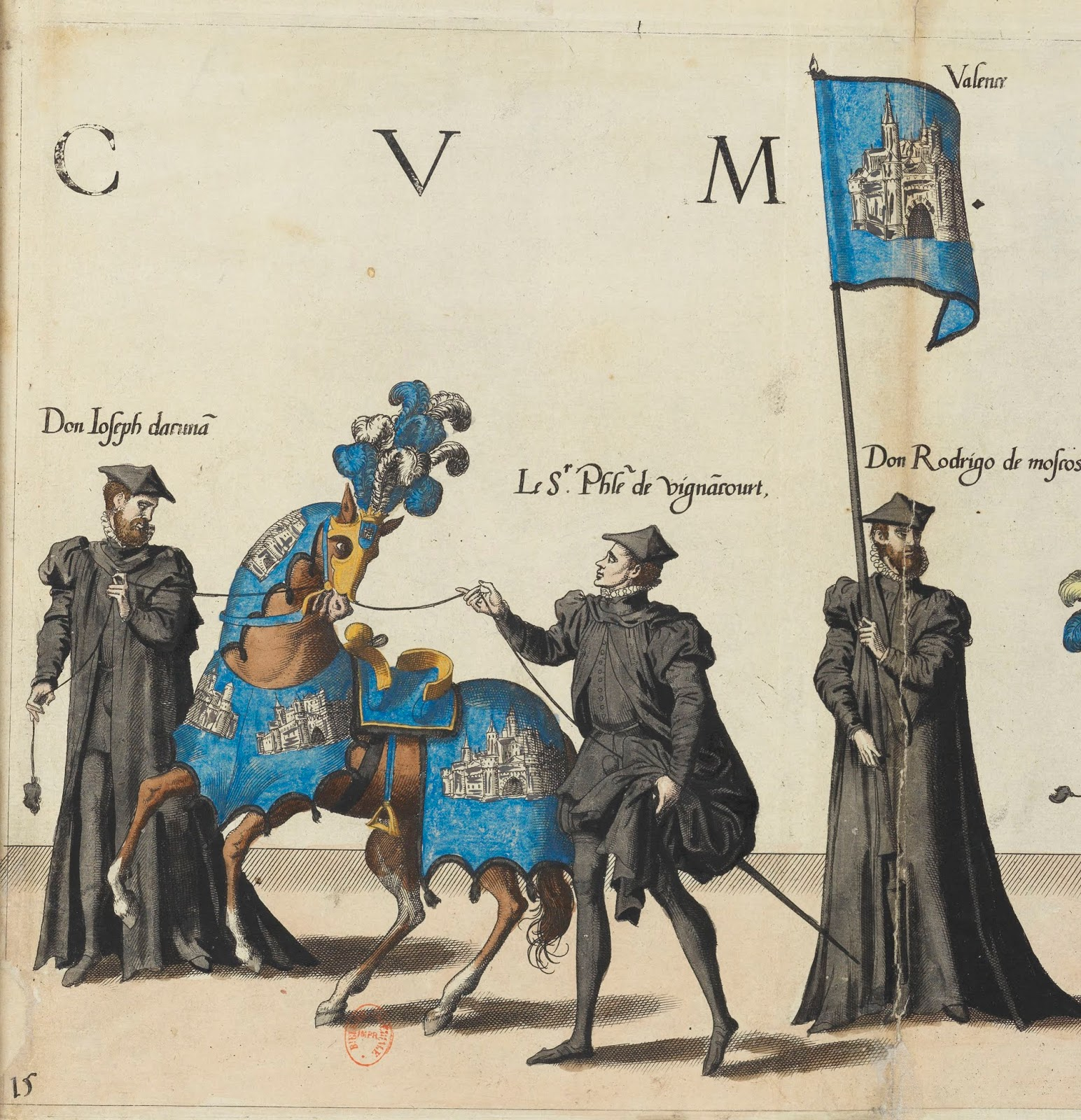 Guion y caballo engualdrapado con el emblema heráldico del Reino de Valencia en las exequias por la muerte de Carlos I de España y V como emperador del Sacro Imperio Romano-Germánico. Calcografía coloreada.